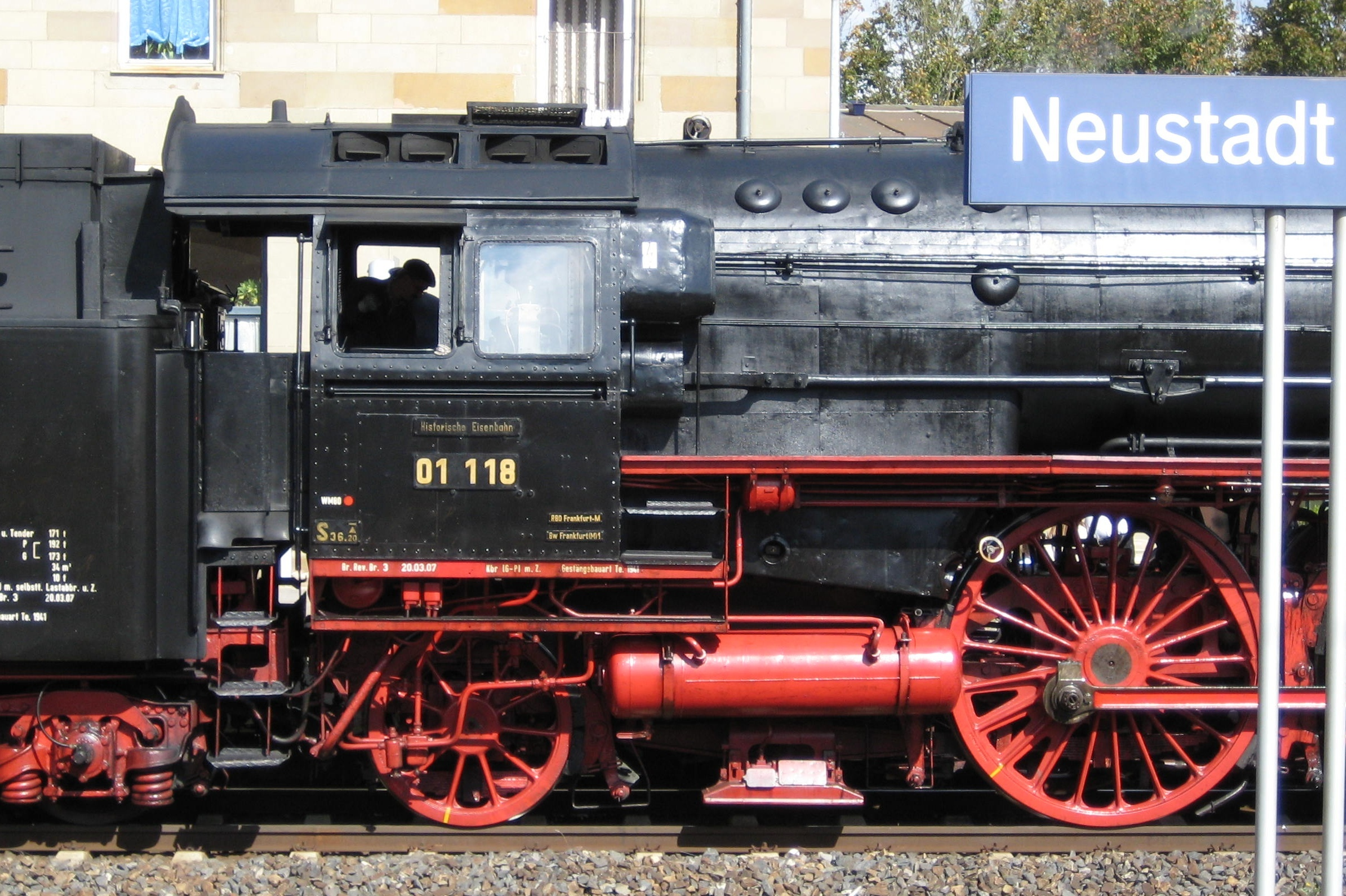 Dampflokomotive 01-118 (DRG-Baureihe 01) der Historischen Eisenbahn Frankfurt auf dem Bahnhof Neustadt (Aisch) in Neustadt an der Aisch, Deutschland, 15. September 2007